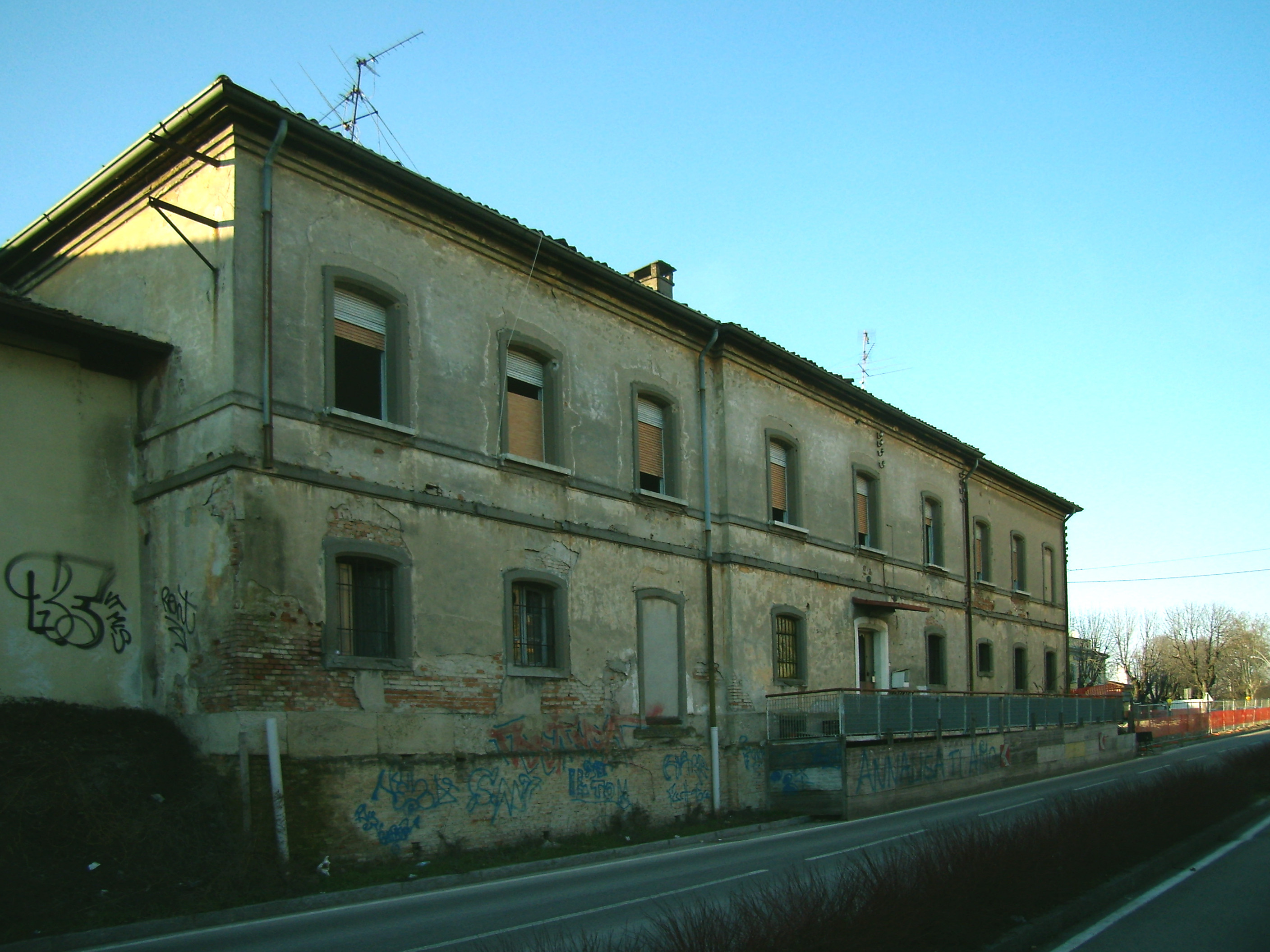 Seconda stazione ferroviaria di Treviglio